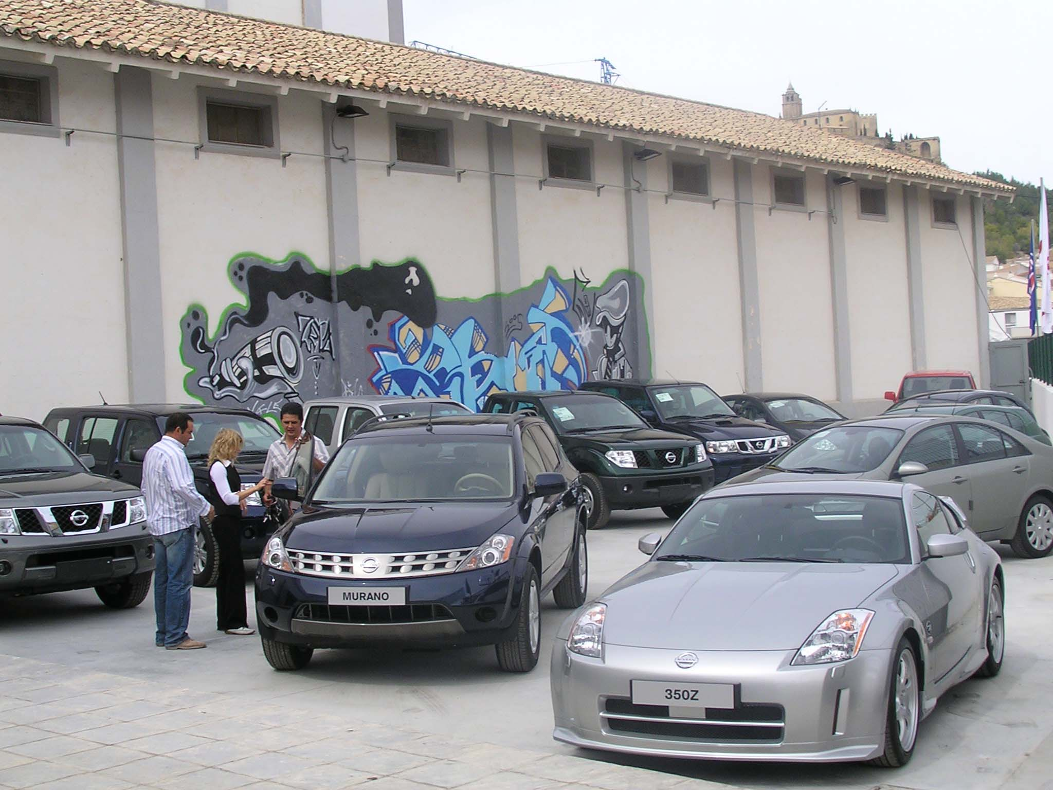 Runa Simi: Nissan-pa antawan qhawachiy, Ispañapi.